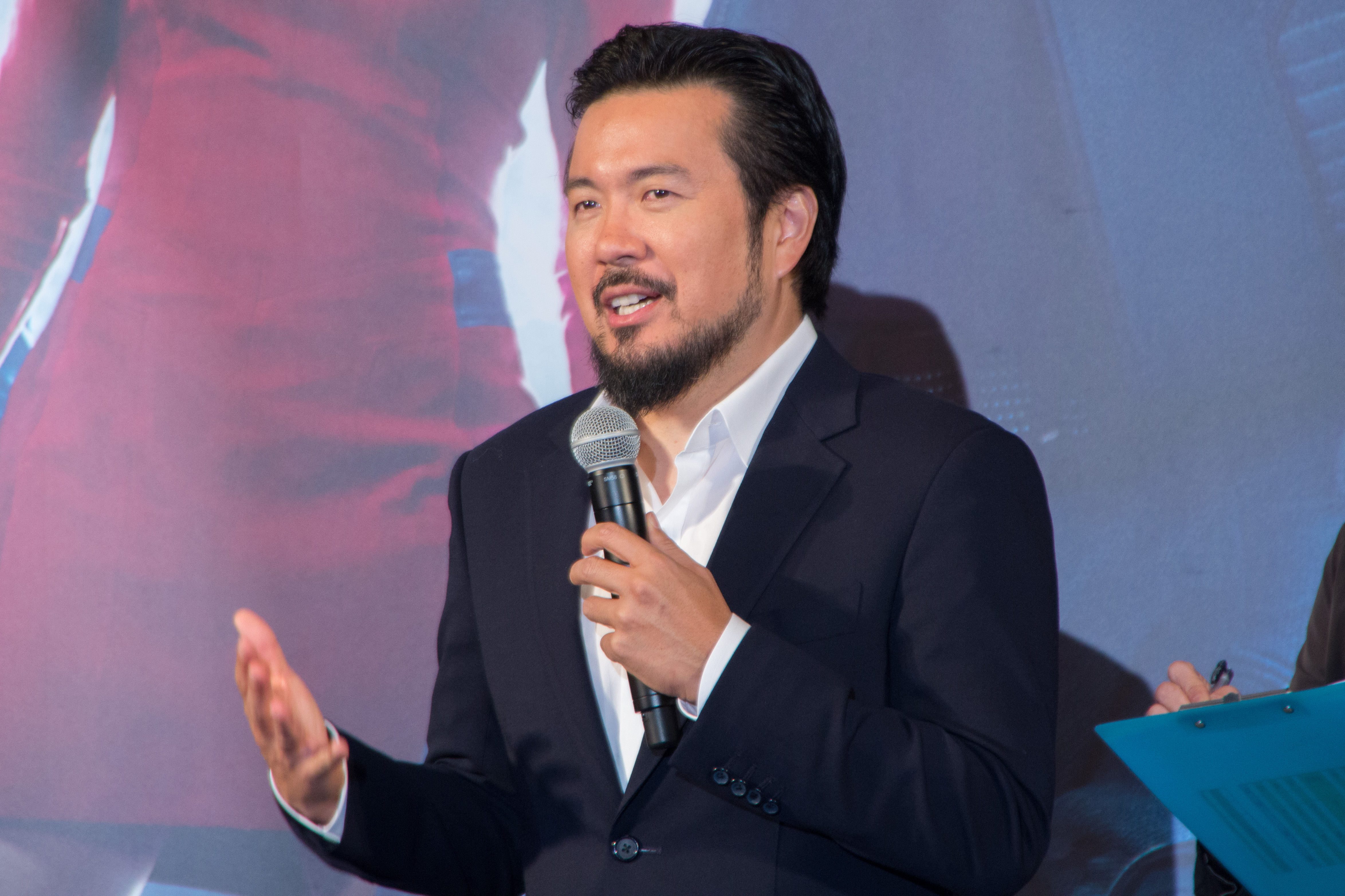 スター・トレック BEYOND ジャパン・プレミア レッドカーペット ジャスティン・リン